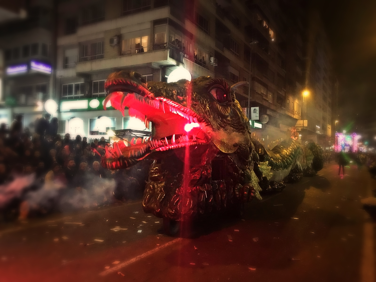 El Dragón de Conte es una escultura del artista murciano González Conte que desfila durante el tradicional Entierro de la Sardina en Murcia (Interés turístico internacional). Se trata de la figura de un Dragón articulado dirigido por operarios que expulsa fuego por la boca e ilumina sus ojos. Compone el cortejo de la cabalgata del Entierro, la escultura lleva apareciendo en el desfile varias décadas y se ha convertido en uno de los símbolos del mismo. Supone un ser mitológico más de esta fiesta dedicada a los seres y criaturas fantásticas y a los dioses de la mitología griega y latina. This is a photography of a Folklore festival in Spain (Wikidata id Q2886090).